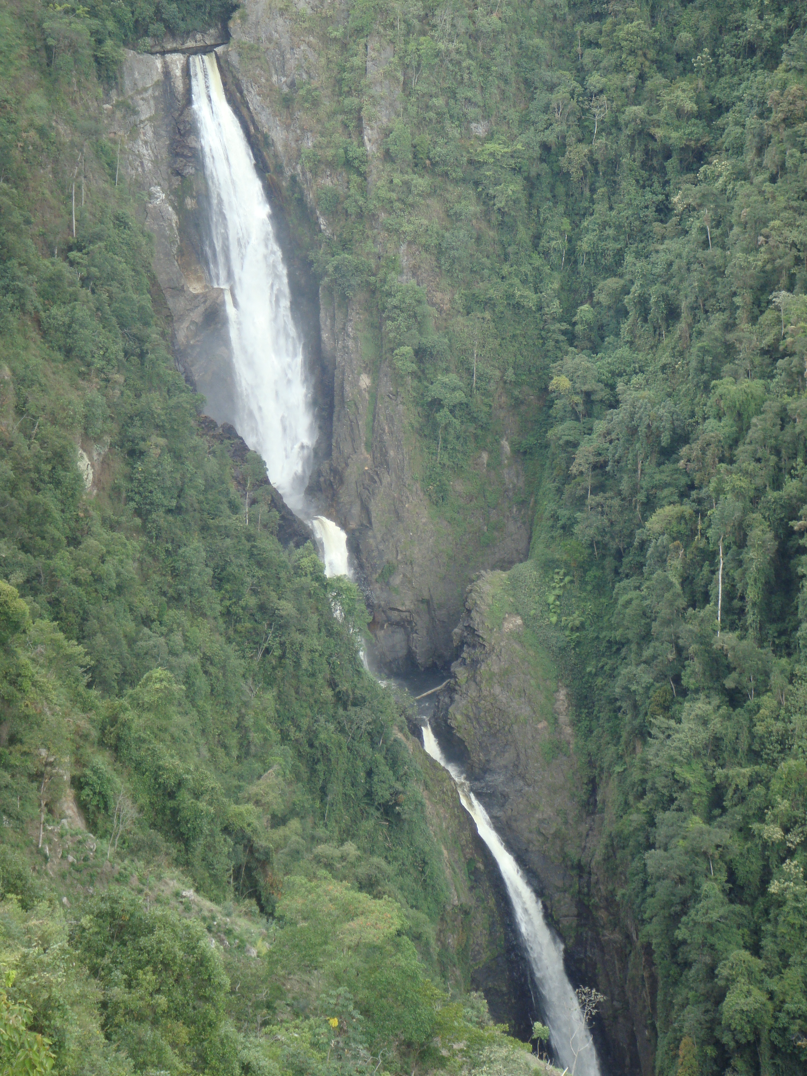 Salto de Mortino, Colombia